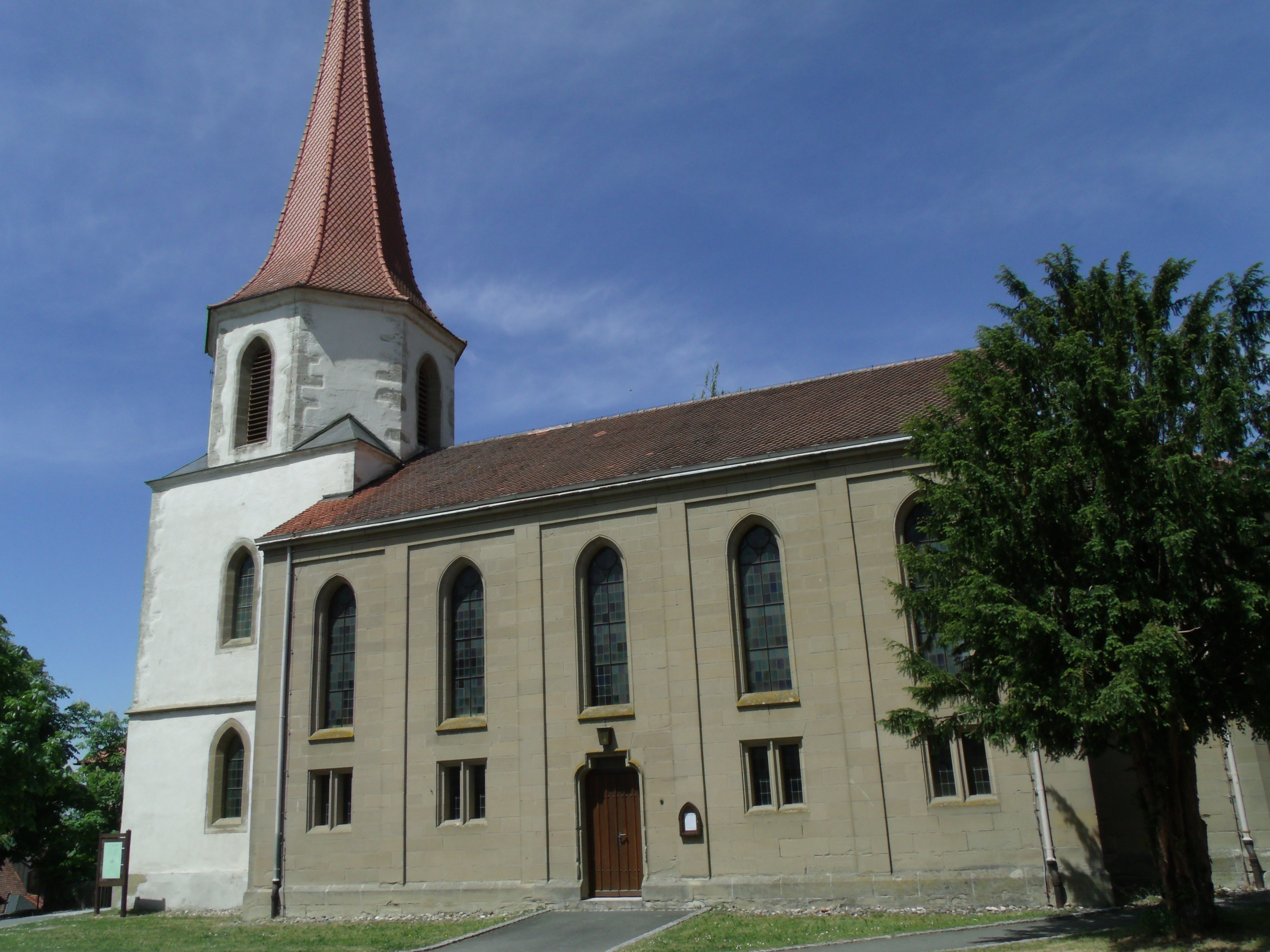 Colmberg, St. Ursula